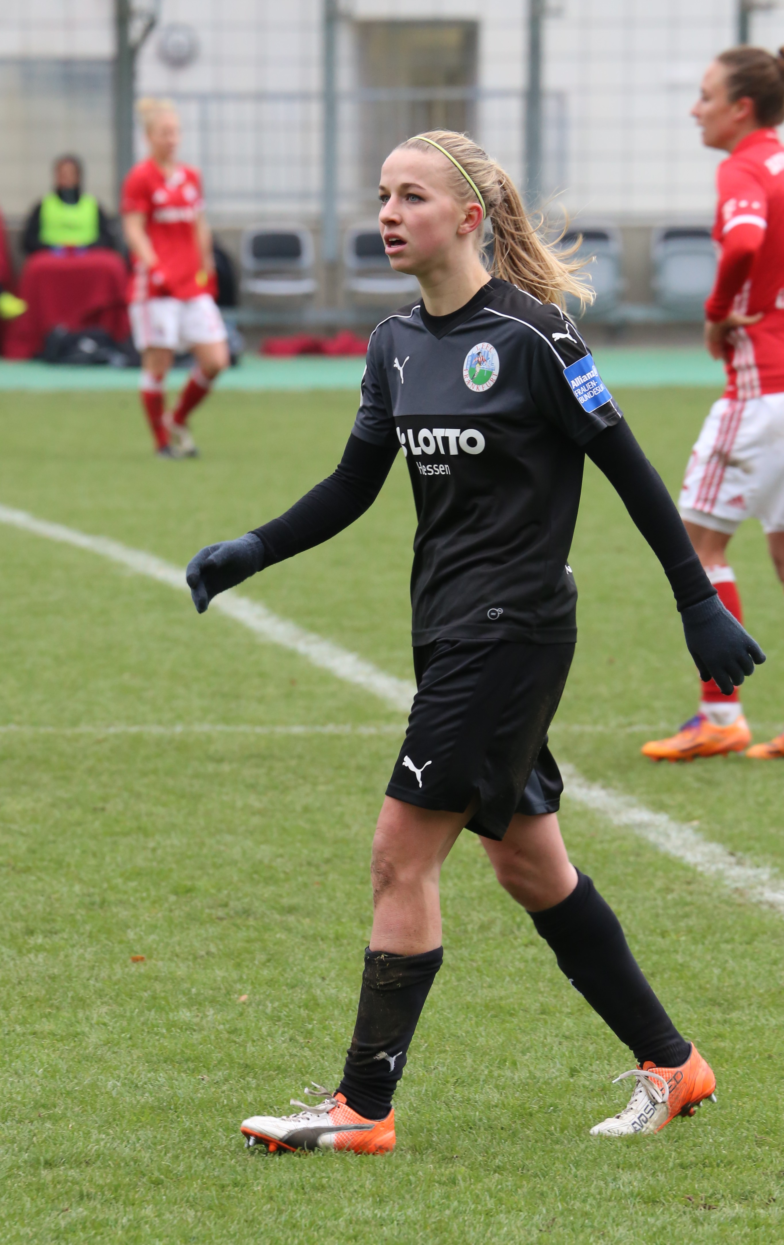 Jackie Groenen (1. FFC Frankfurt) beim Frauen-Bundesliga-Spiel FC Bayern München gegen 1. FFC Frankfurt am 13. November 2016 im Stadion an der Grünwalder Straße, München (Ergebnis war 1:0).